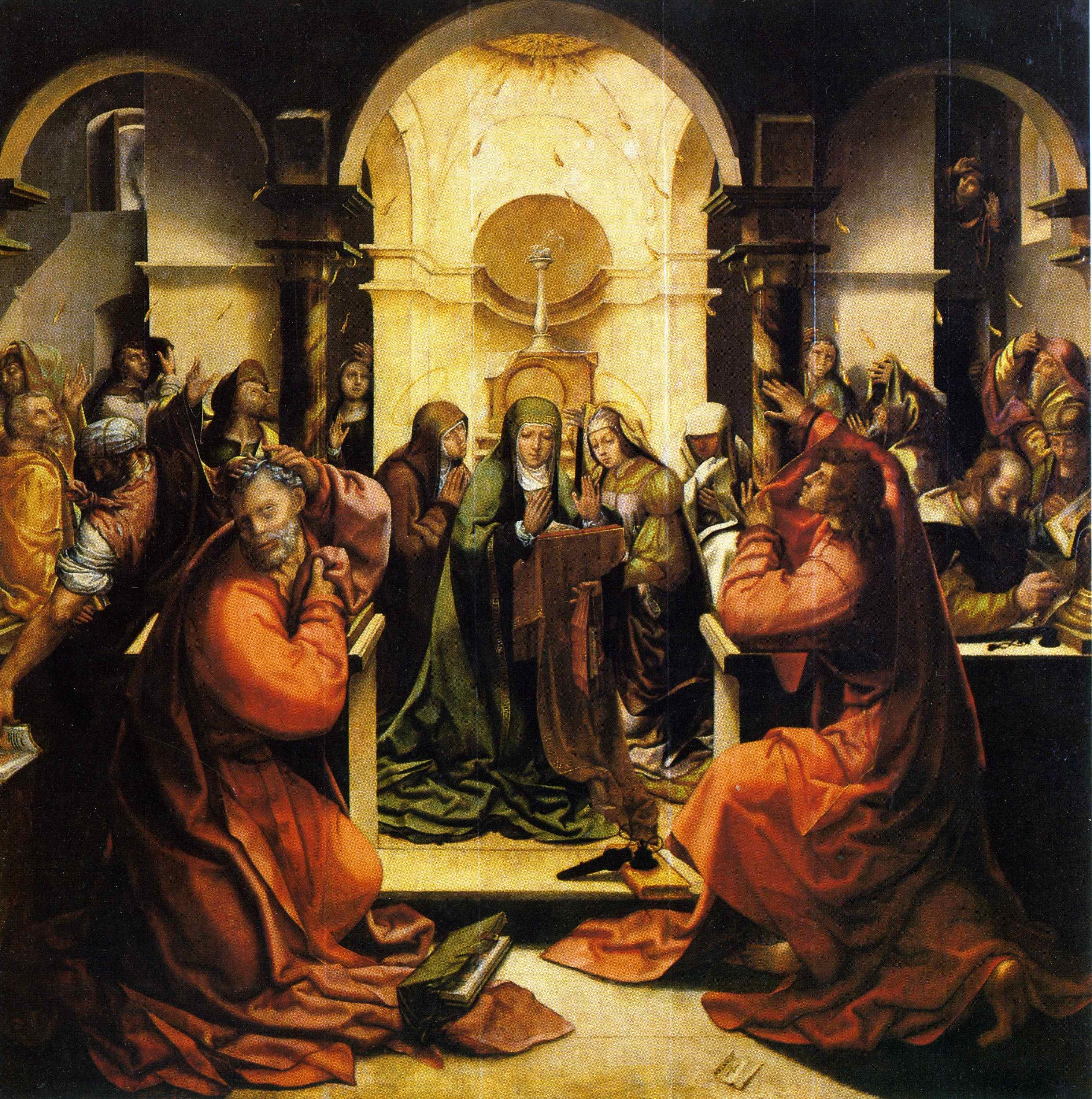 Retable de Vasco Fernandes, "Grão Vasco" (Grand Vasco), Pentecôte, Coimbra, signé "Velasco""